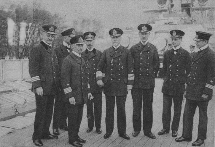 l'amiral Erhard-Schmidt ici comme vice-amiral et son état-major en 1916; il se trouve au centre.